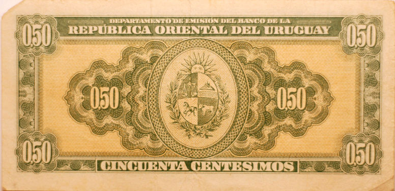 Uruguay 50 Centésimos from 1939 - Side 2